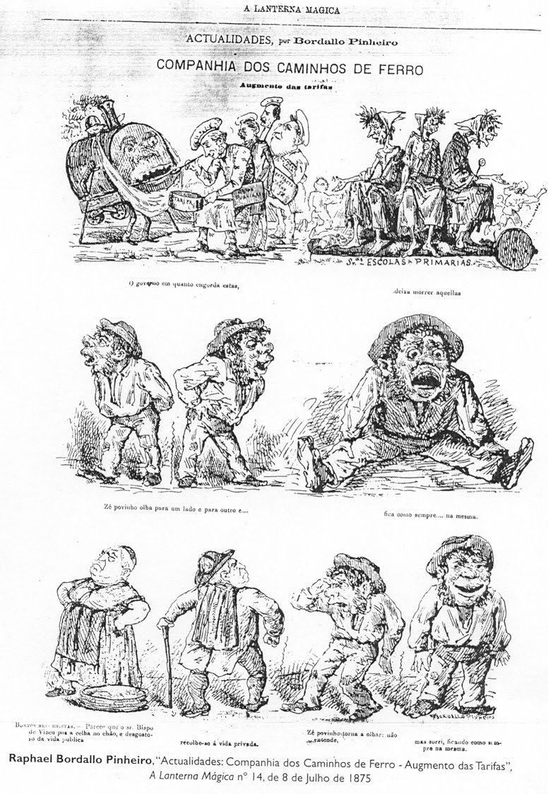 Primeira publicação do Zé Povinho na revista Lanterna Mágica